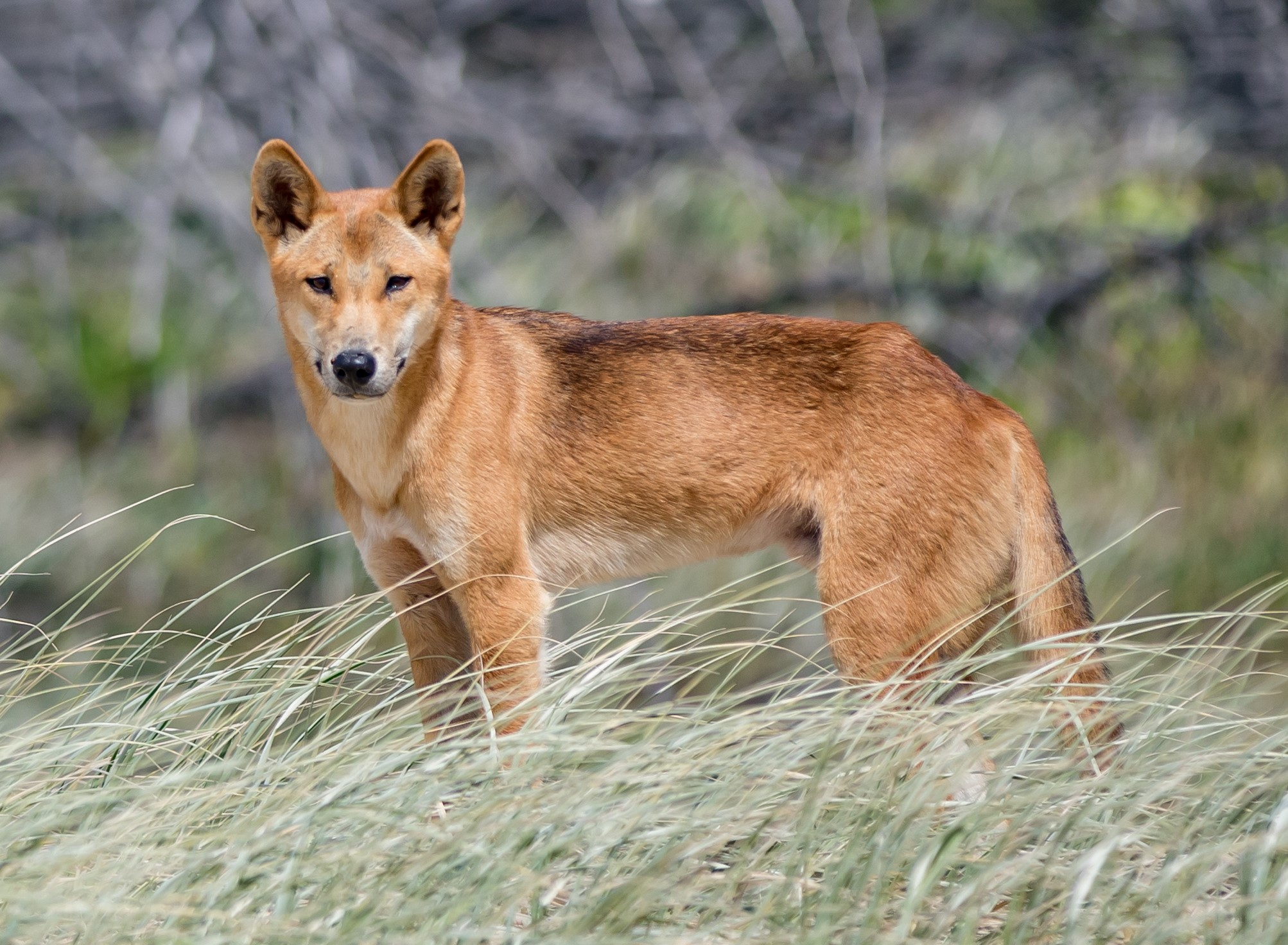 Australian dingo (Canis dingo)